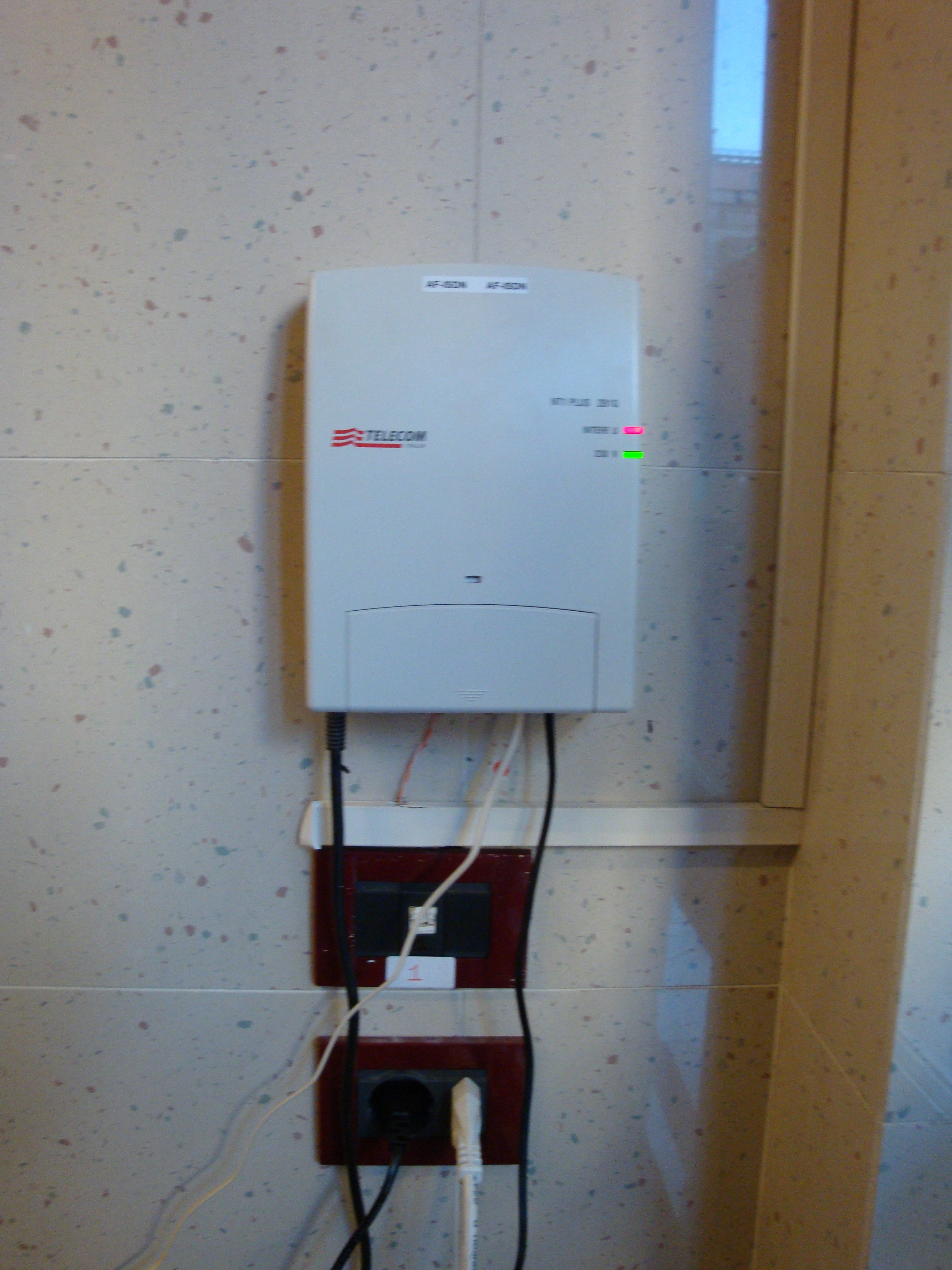 Tipica borchia ISDN NT1 Plus con 1 porta BRI e 2 PSTN